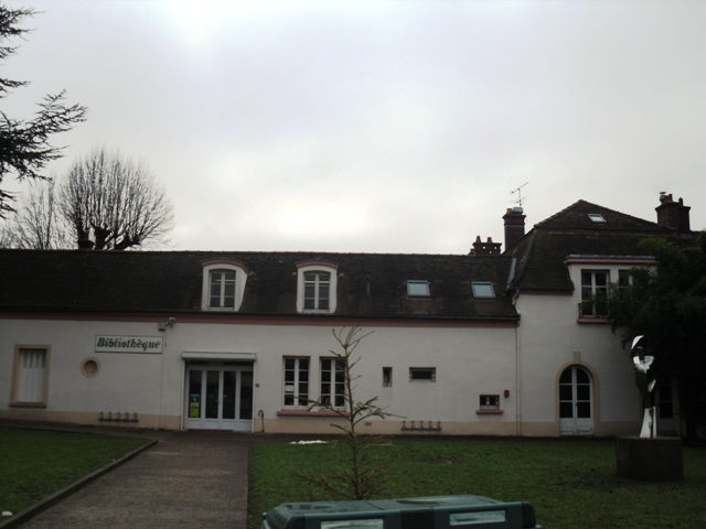 La bibliothèque municipale de Morangis (91)